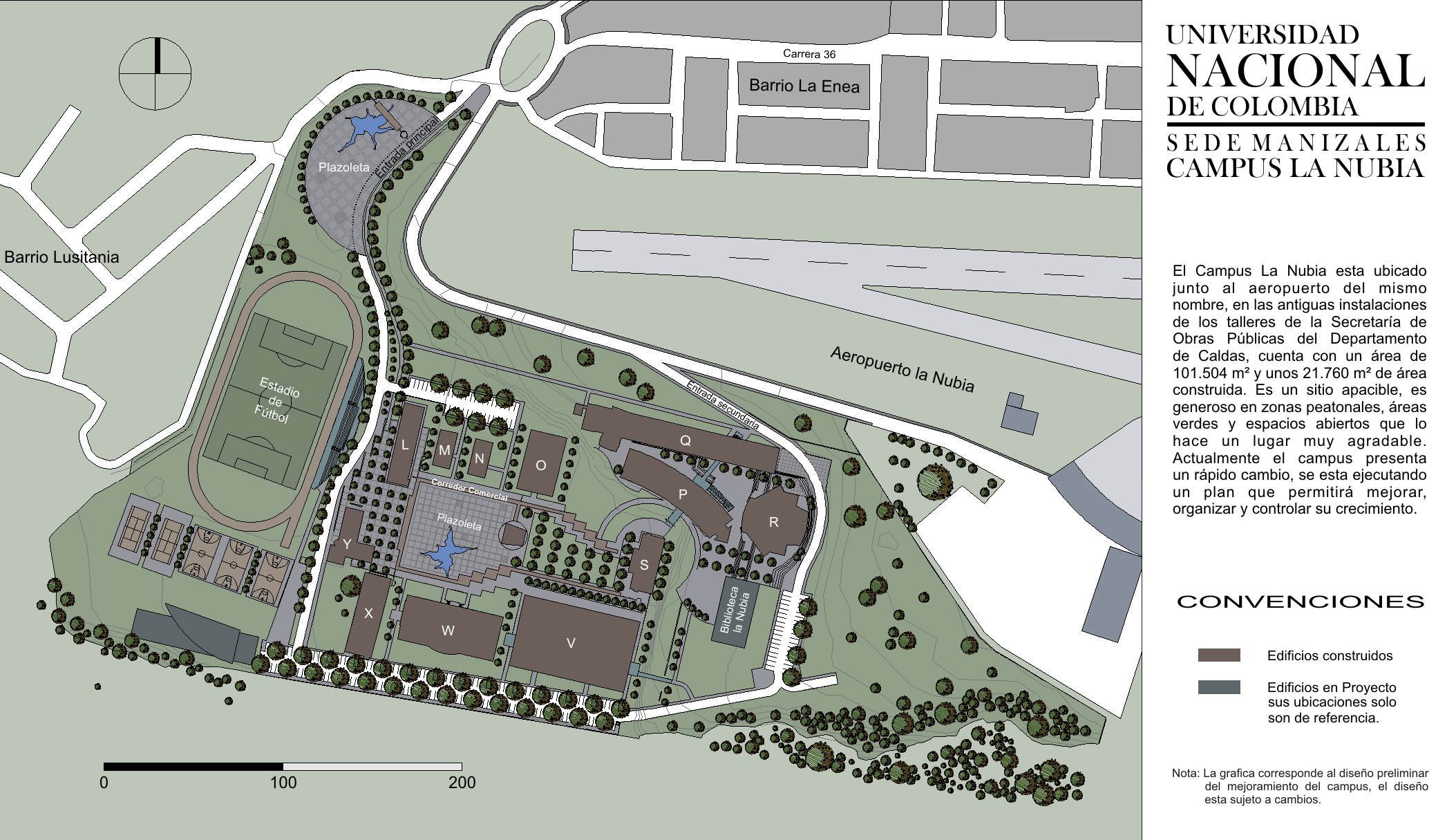 Plano de la Universidad Nacional de Colombia sede Manizales, Campus La Nubia. El mapa esta basado en planos oficiales, si contiene algún error, favor notifíquelo en mi página de usuario, en la sección discusión.